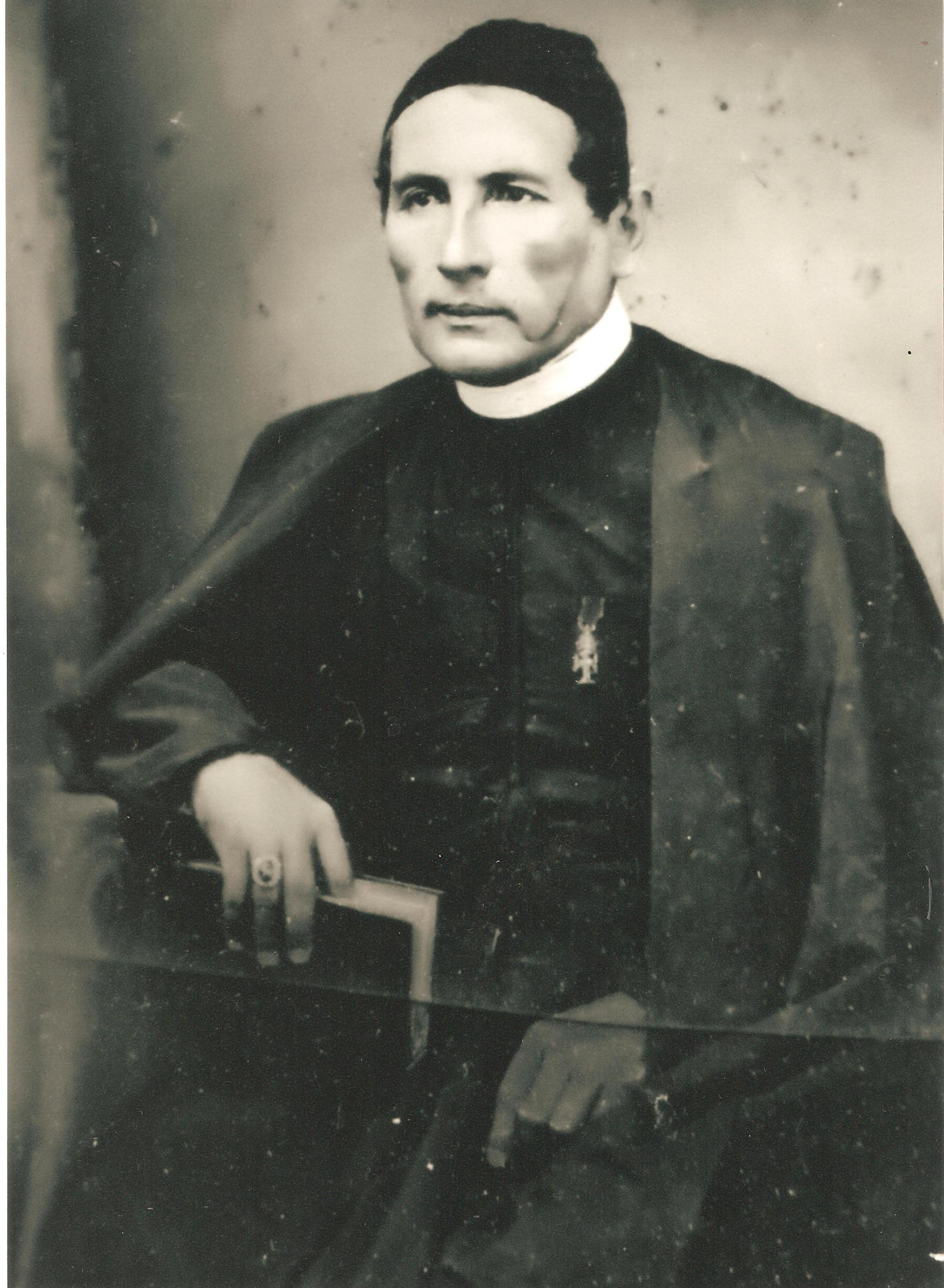 Padre José Modesto Pereira de Brito (1808-1888), em fotografia de 1885. É considerado o fundador da cidade de Granito-Pernambuco-Brasil.